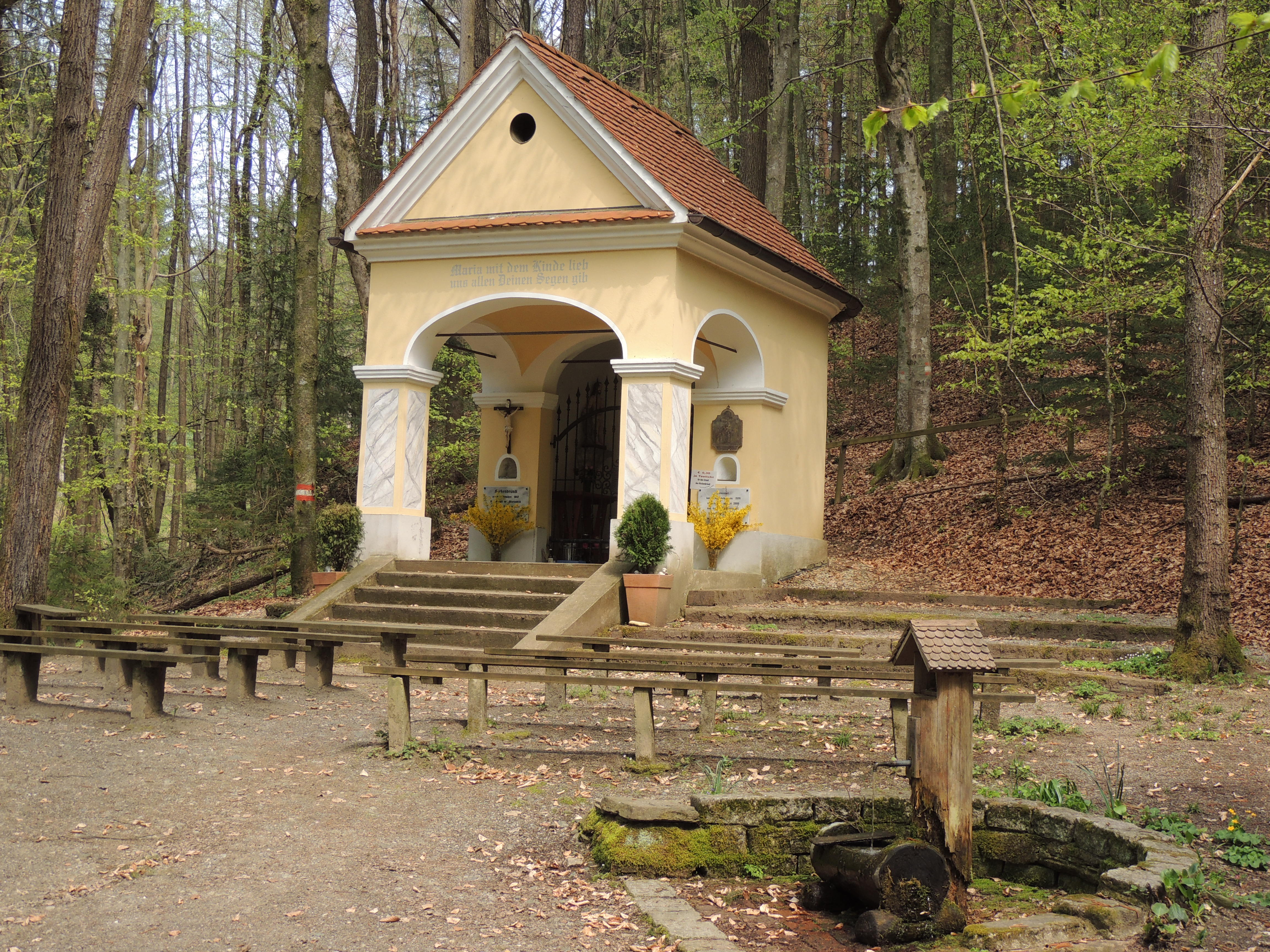 Köckenbründl Nestelbach im Ilztal